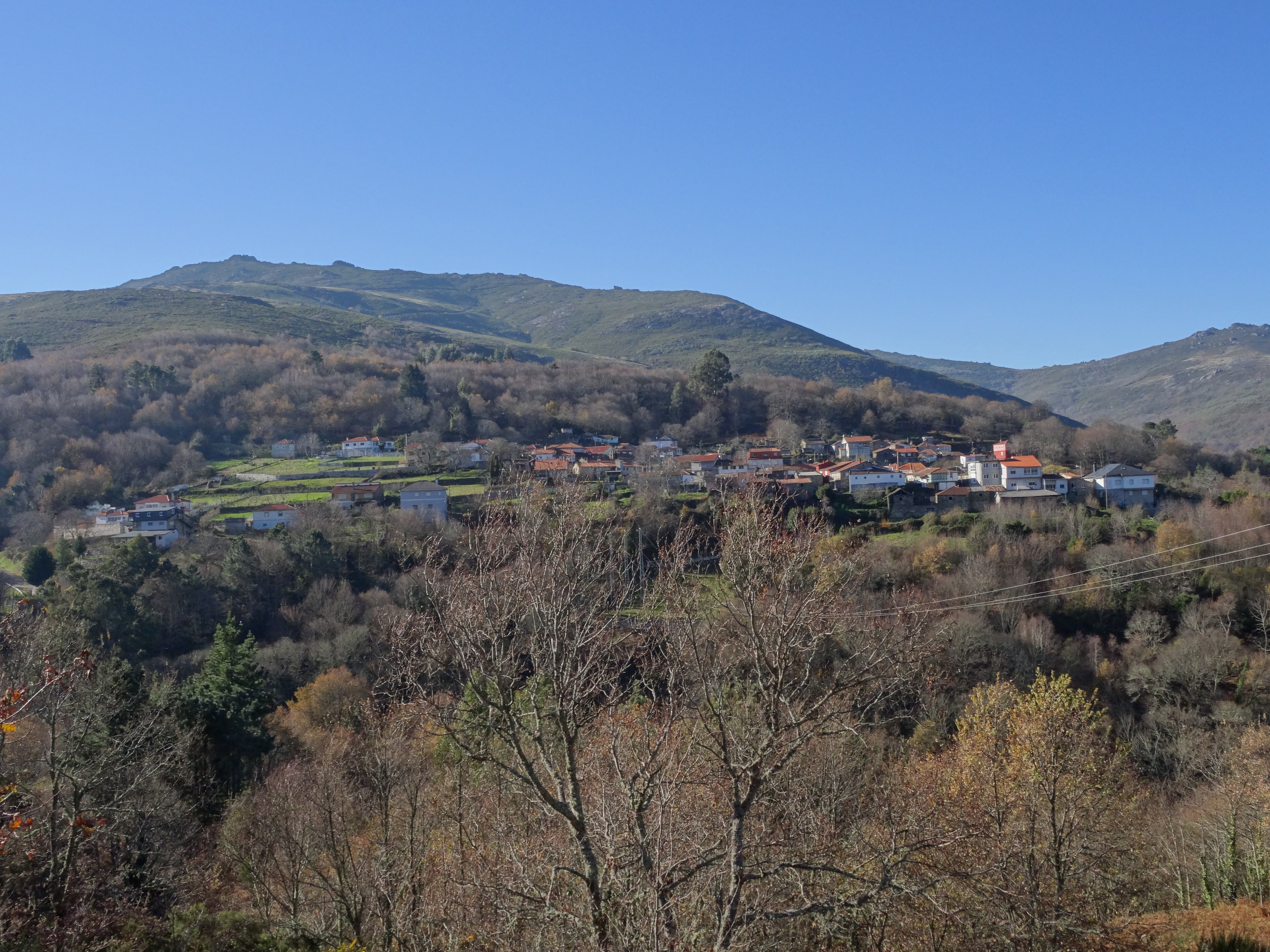 Ver título.